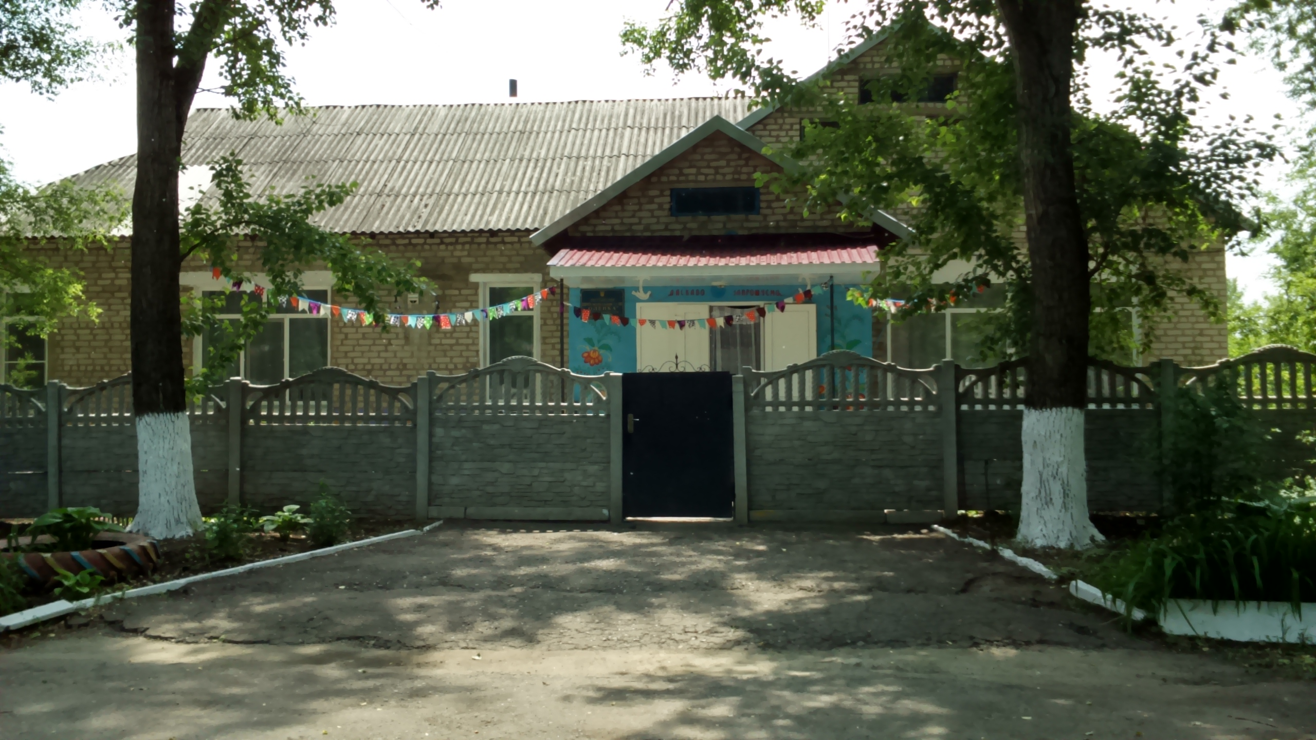 Дитячий садок селищі Новий Донбас.